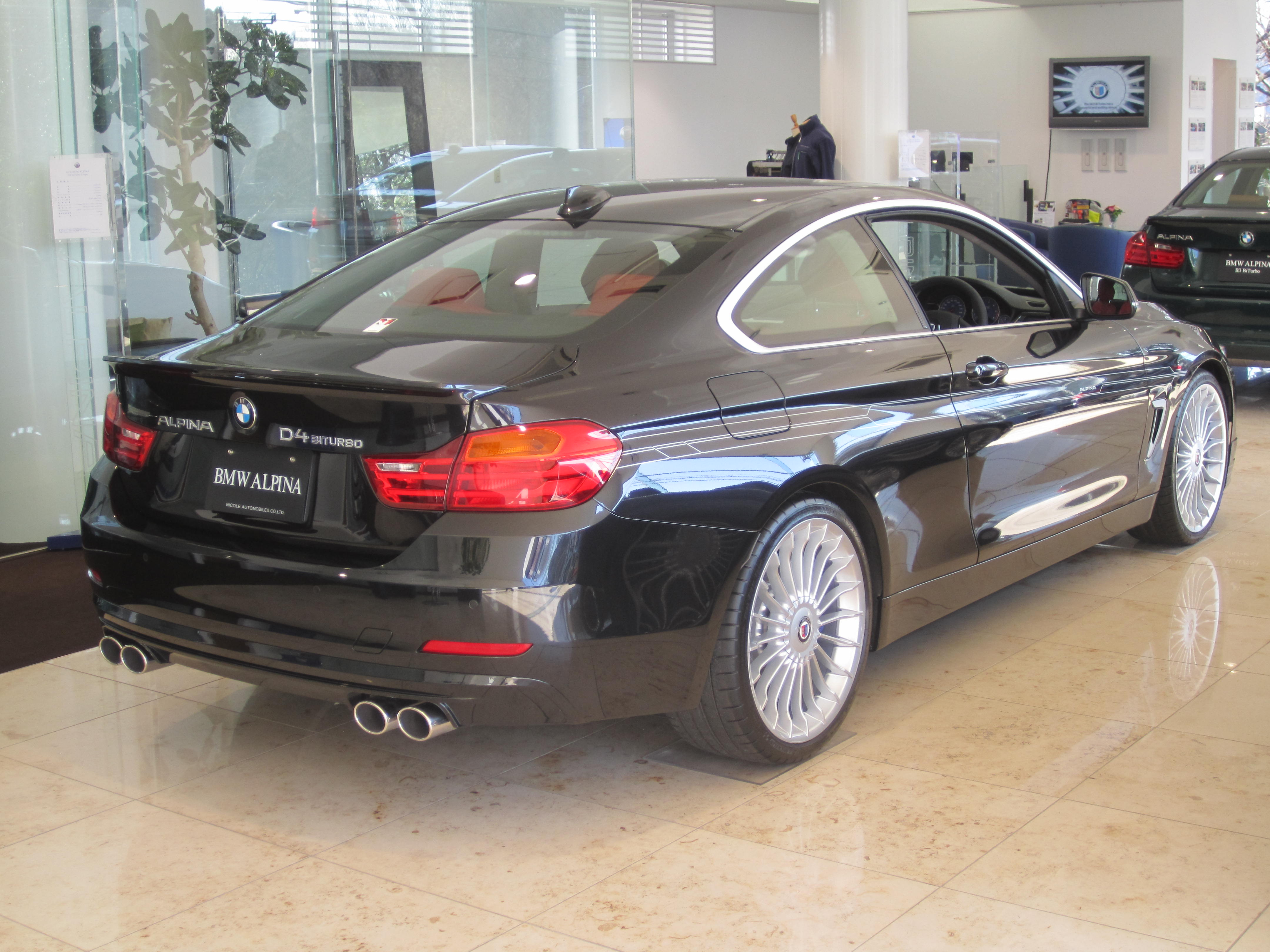 ALPINA D4 リア